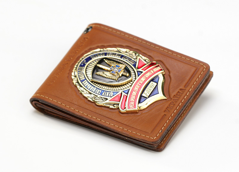 Жетон на службовому посвідченні Управління "А" ЦСО СБУ